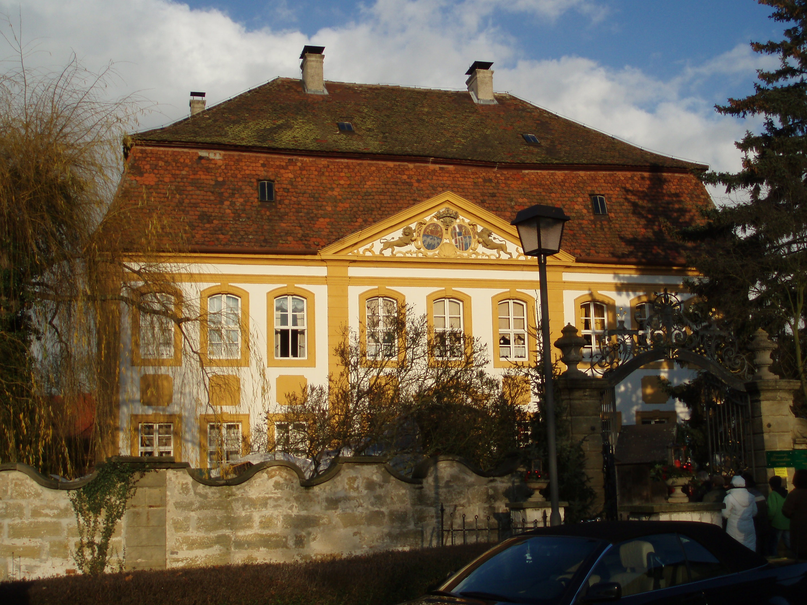 Schloss Unterleiterbach, Gemeinde Zapfendorf (Oberfranken), Fassade mit (optisch) links Wappen Brockdorff, rechts Wappen gespalten Schaumberg/Brockdoff